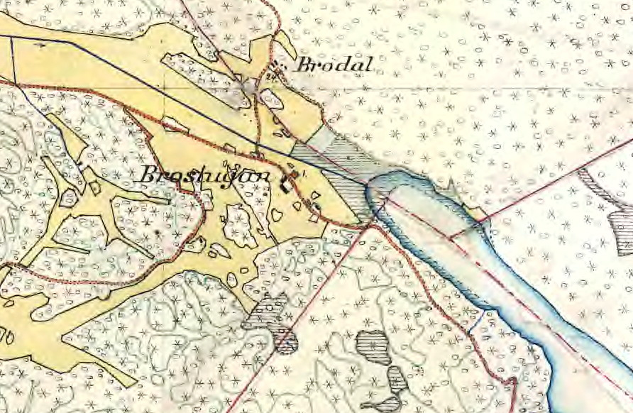 Brostugan, Flemingsberg på Häradsekonomiska kartan